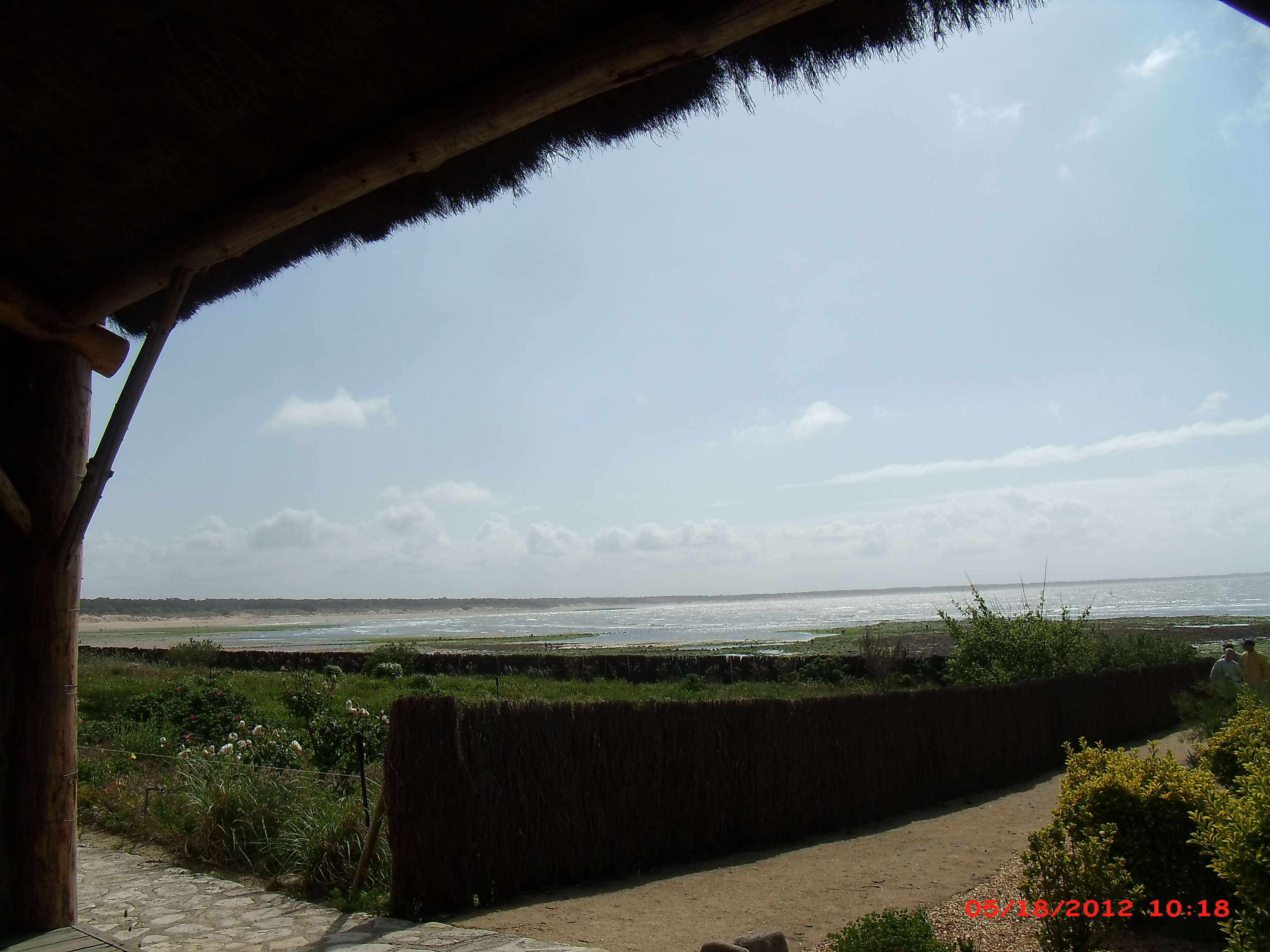 Maison de Georges Clémenceau, Saint-Vincent-sur-Jard (Vendée). Vue sur la plage du Goulet et la mer depuis le kiosque.